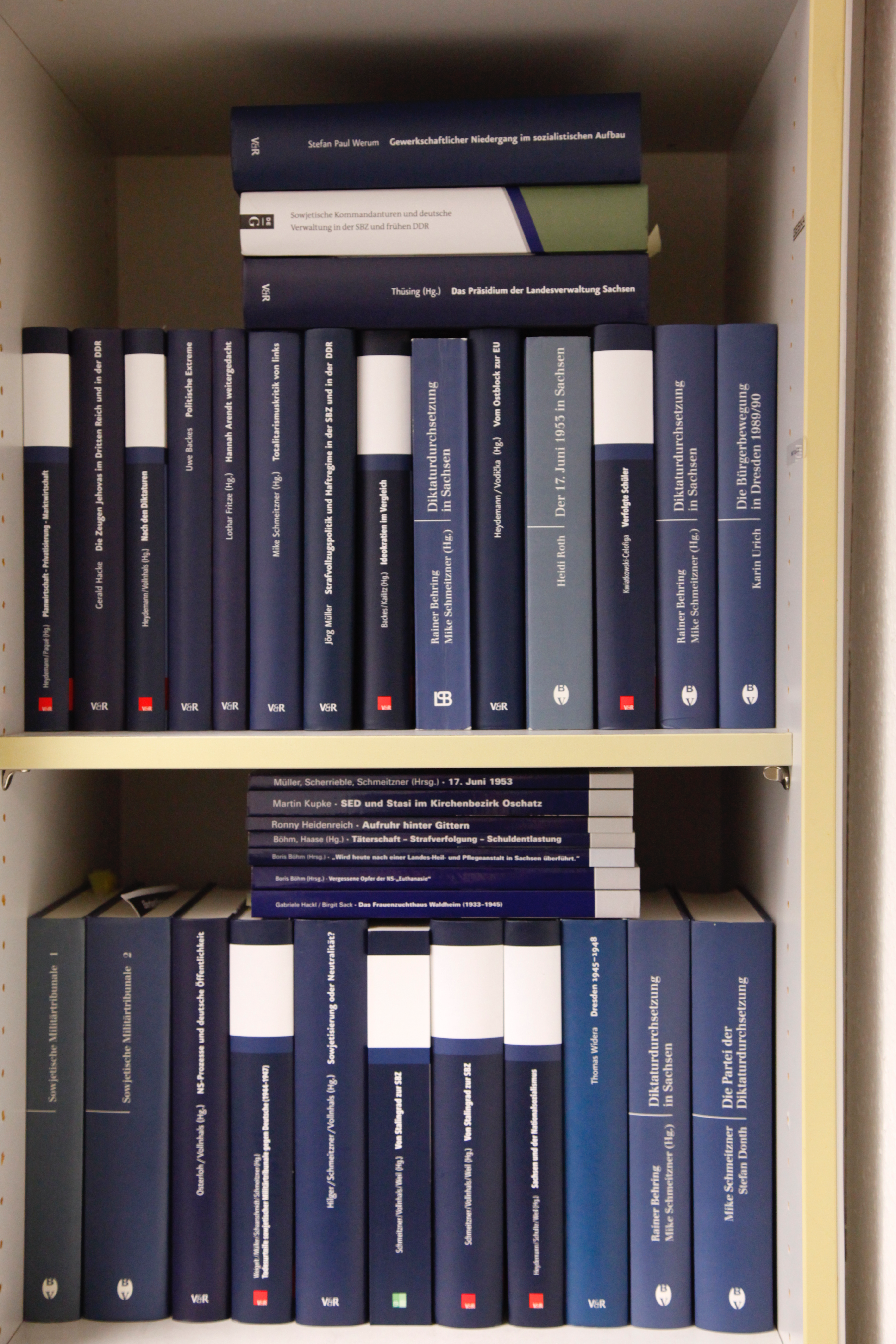 Hannah-Arendt-Institut für Totalitarismusforschung Dresden